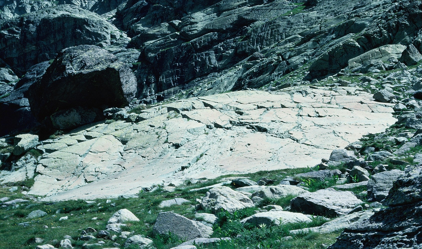 La Vallée des Merveilles, France.